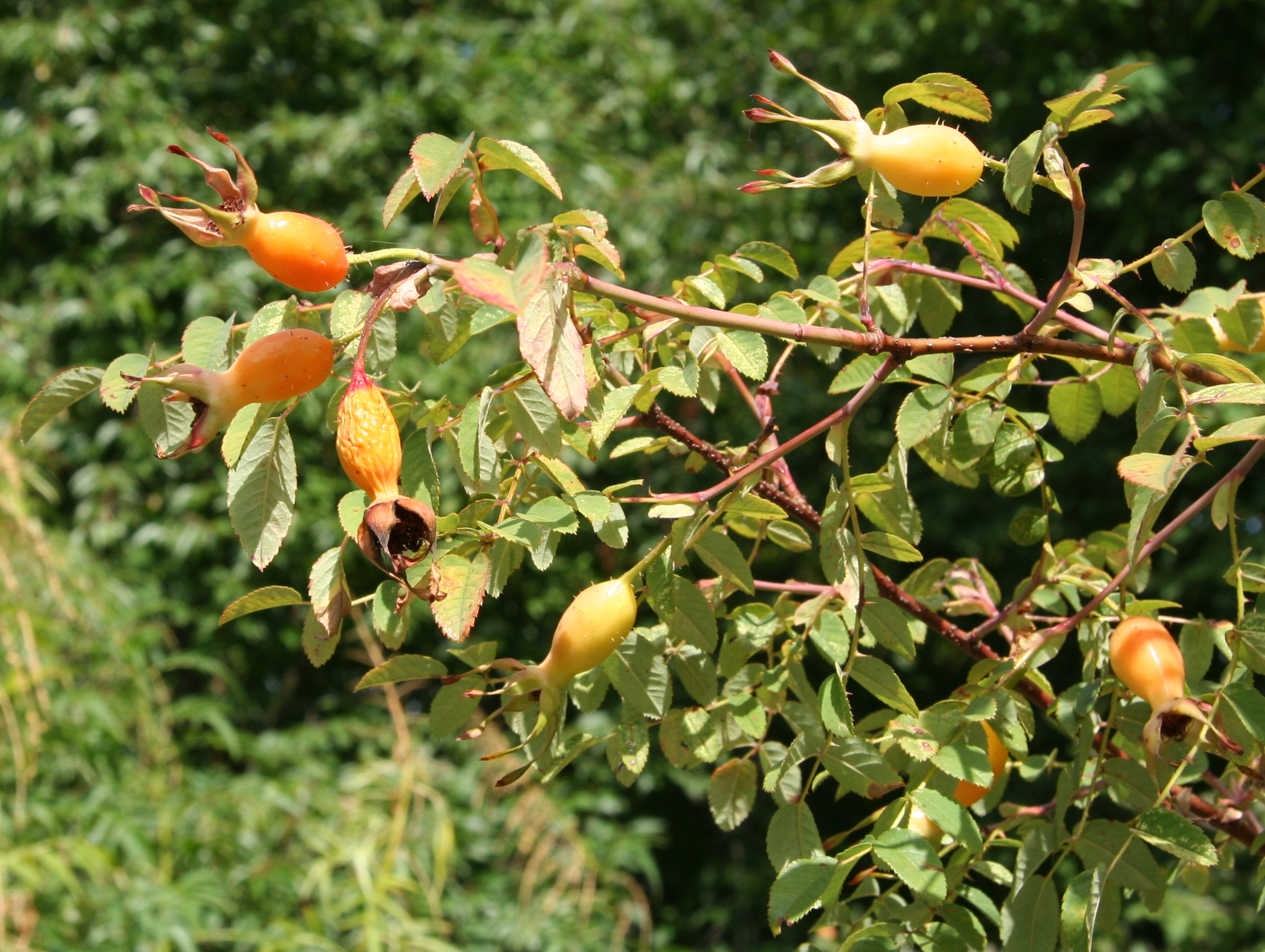 Rosa moyesii im Botanischen Garten Dresden